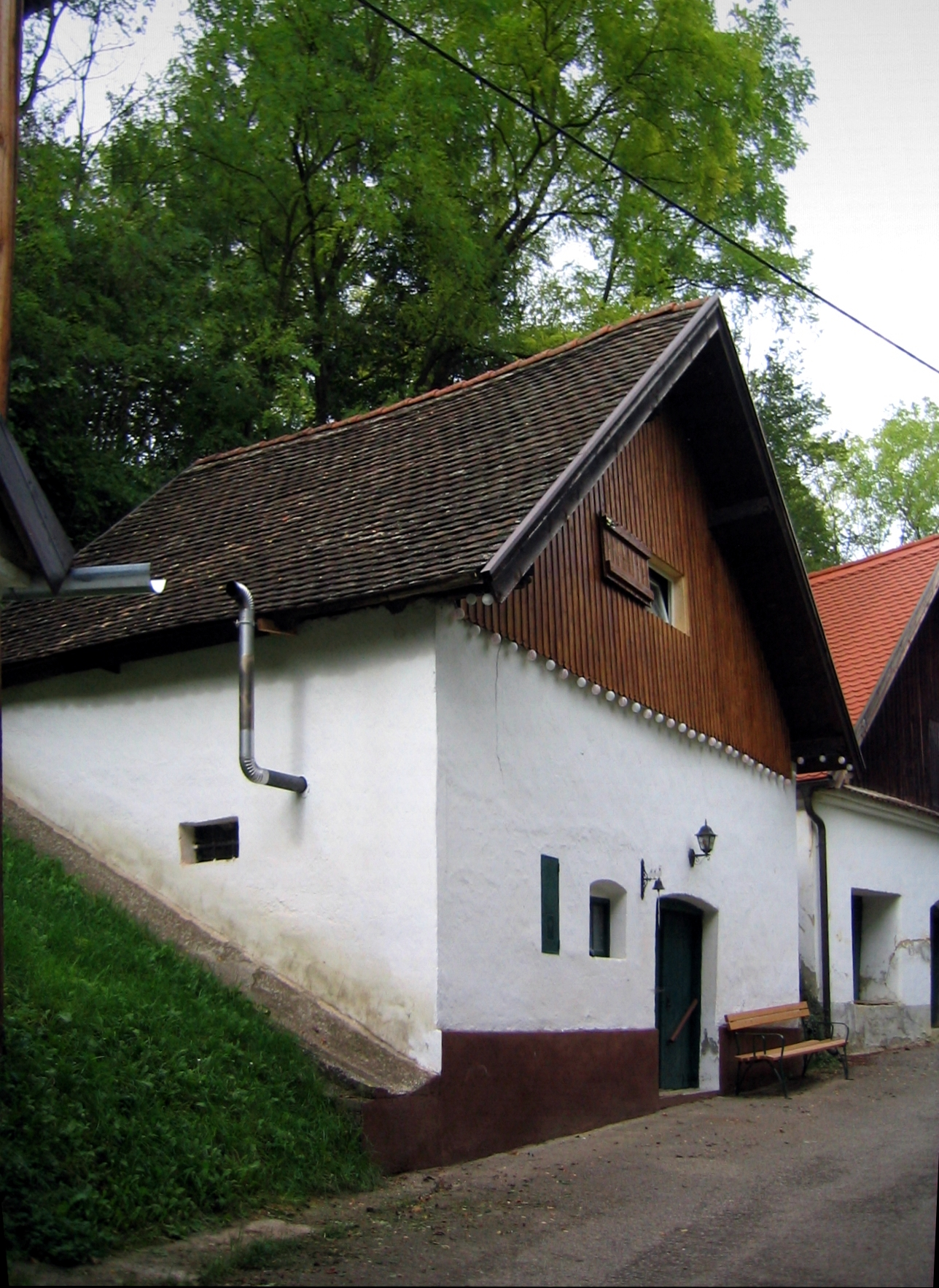 Mühlbergkellergasse Objekt 11